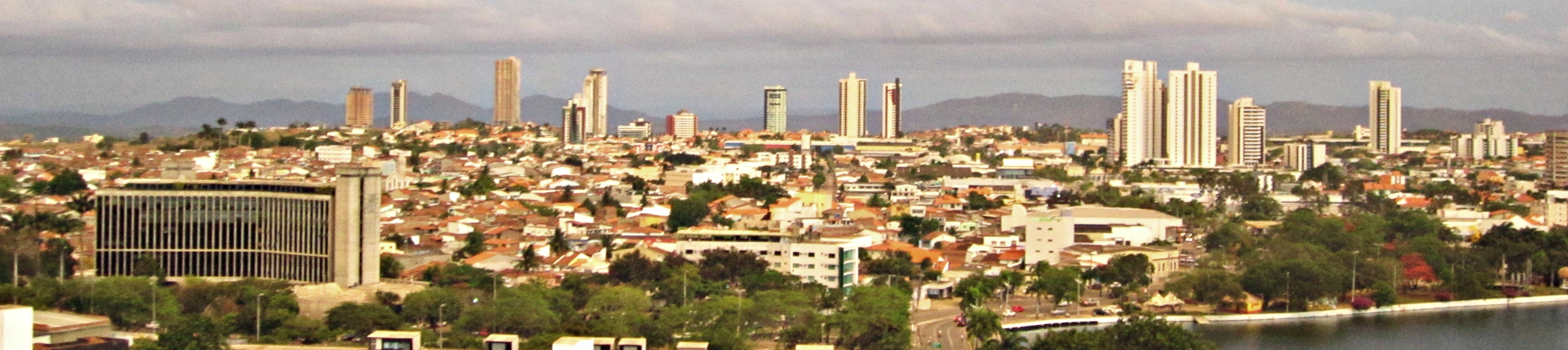 Campina Grande - Paraíba - Brasil